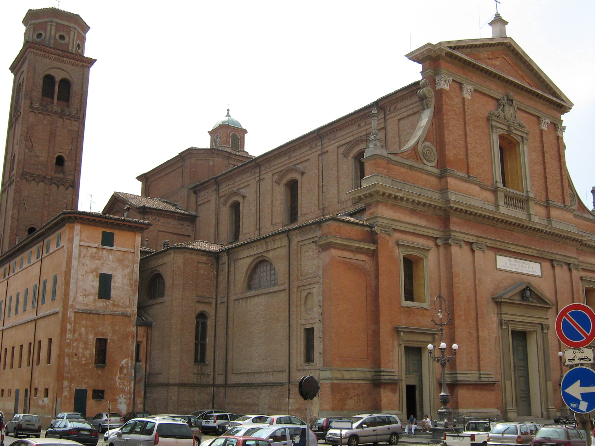 Duomo di Imola (Imola)